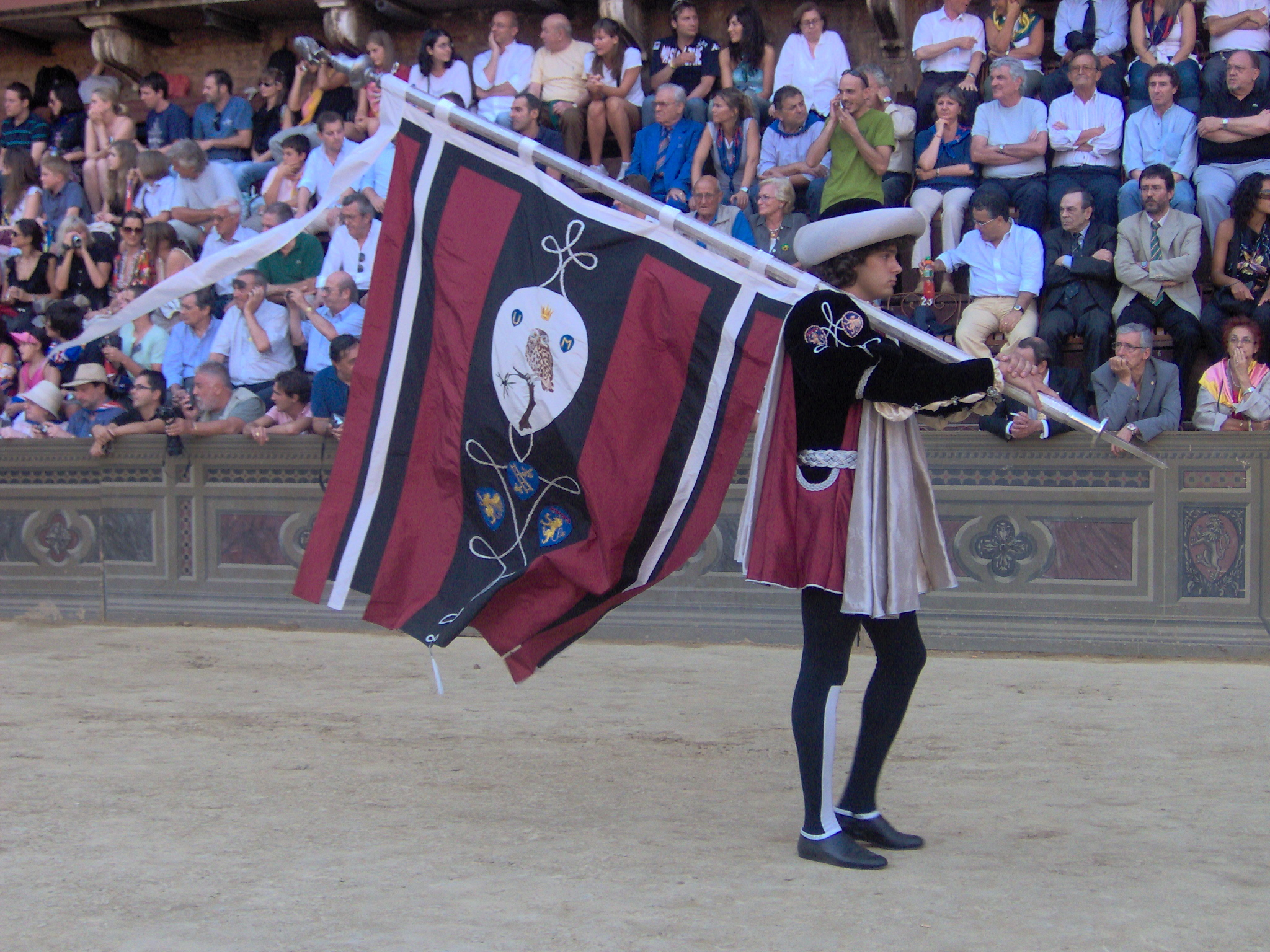 Image Palio dell'Assunta (16/08/2006) - Siena